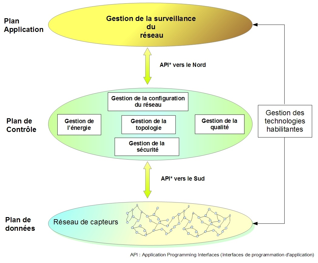 nouveau modele SDWWSN